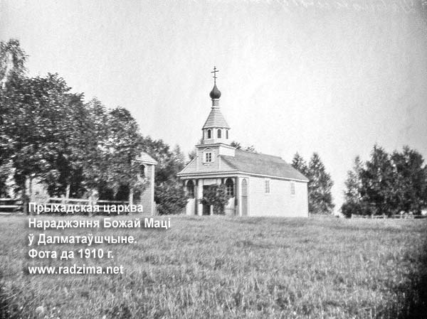 Беларуская (тарашкевіца): Далматаўшчына (Dałmataŭščyna). Царква Раства Багародзіцы па маскоўскай перабудове